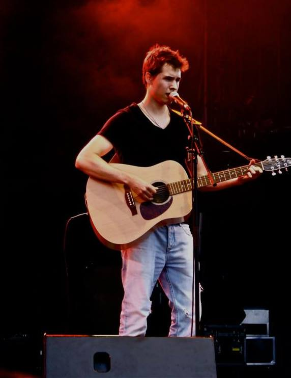 Mathieu Clobert en 2014